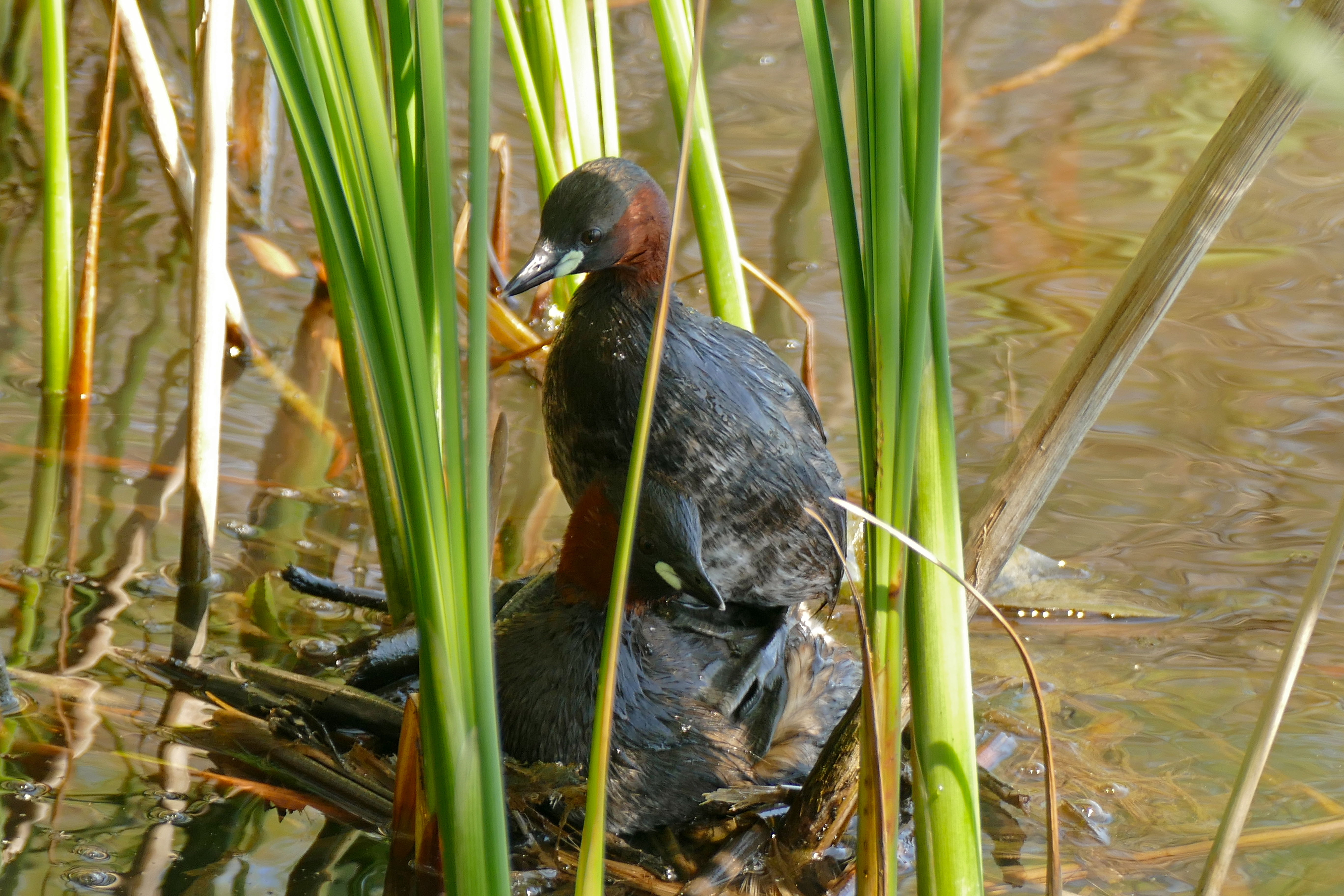 Aguait Quim Franch, Estany del Cortalet, Los Aiguamolls del' Empordà, Castelló d'Empúries, Catalunya, SPAIN